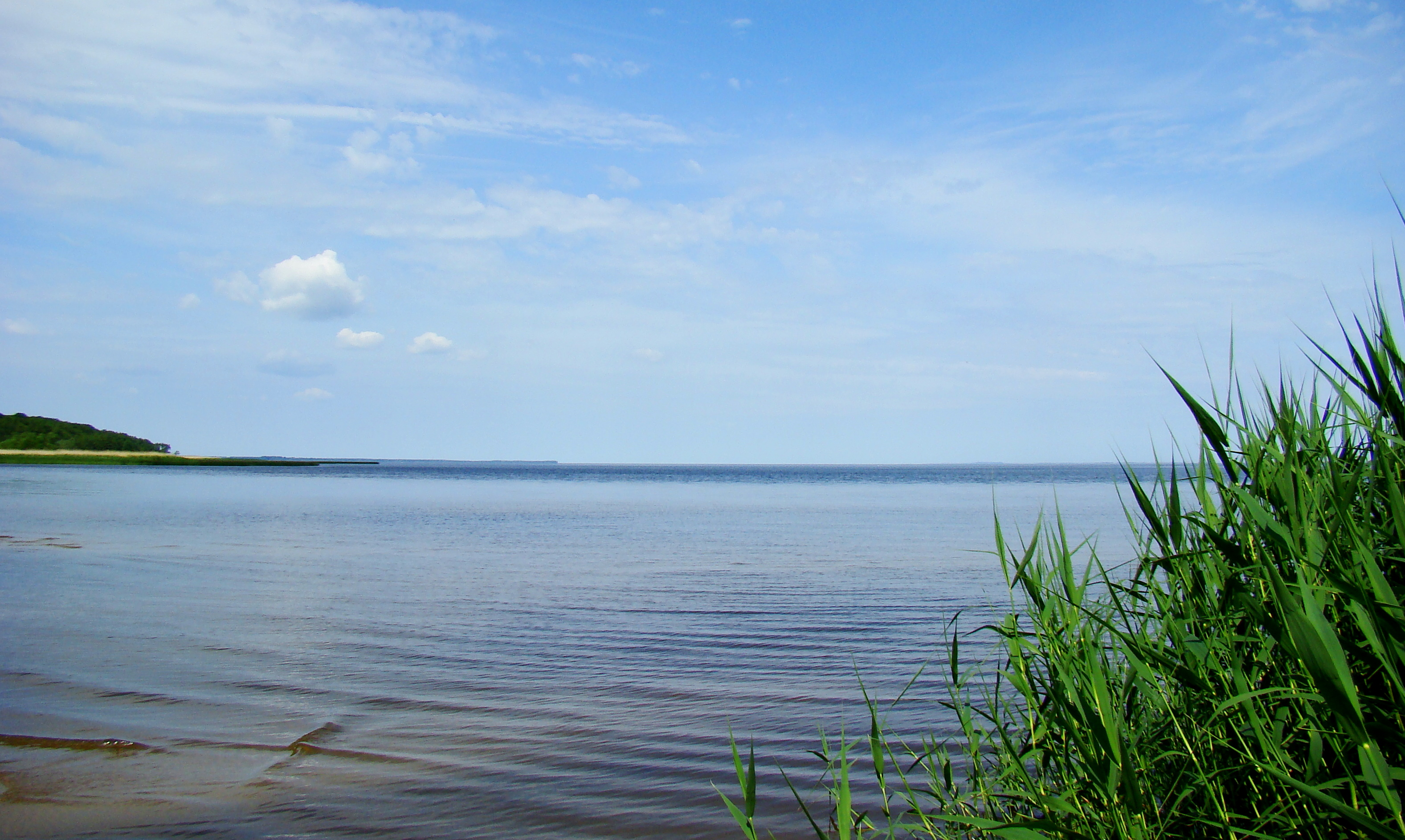 Zalew Szczeciński, zachodni brzeg w tle Puszcza Wkrzańska, (Województwo zachodniopomorskie), Polska